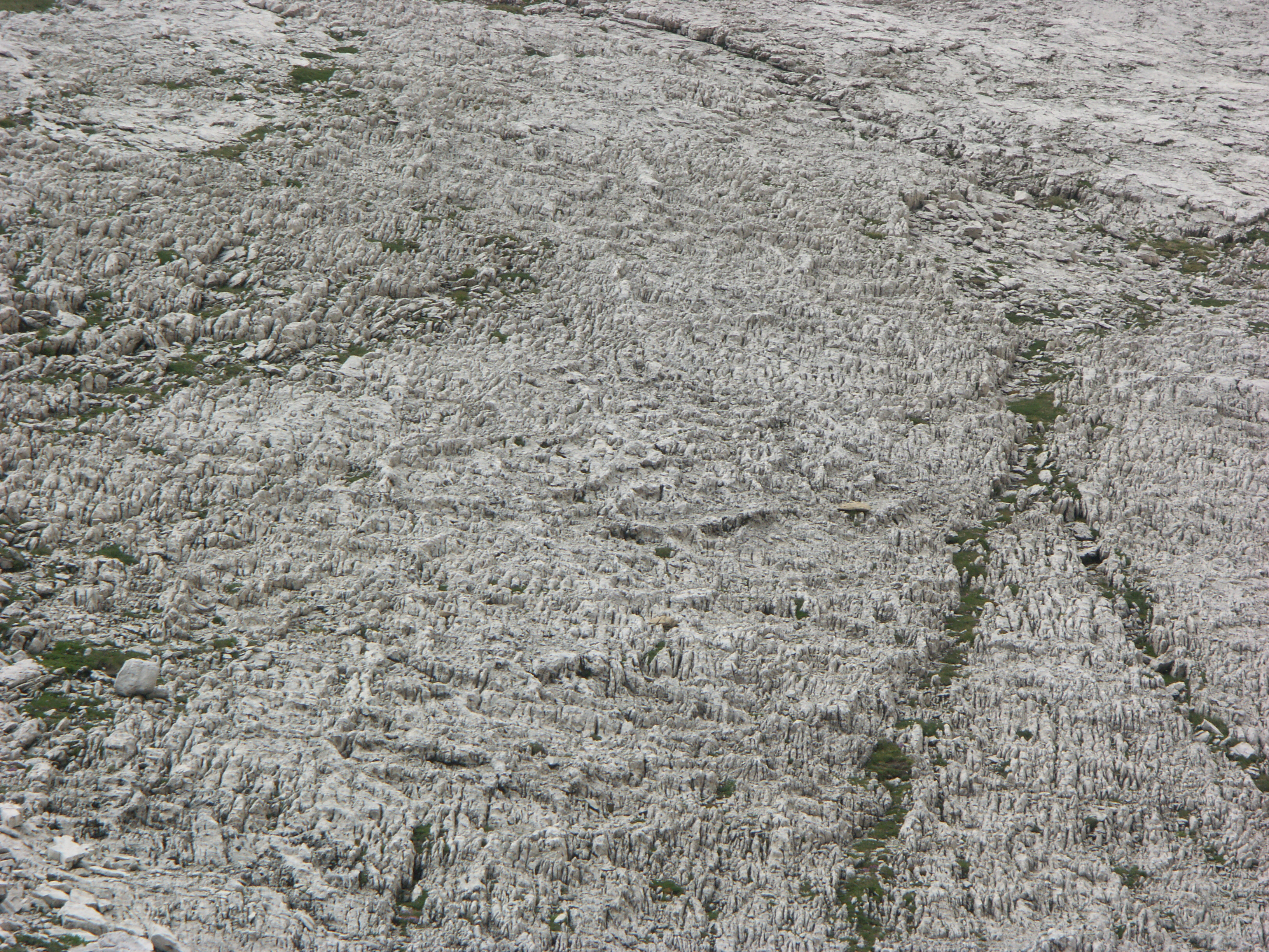 Italien, Dolomiten, Karrenfeld am Formin-Pass (2.462 m), westlich der Cima d'Ambrizzola